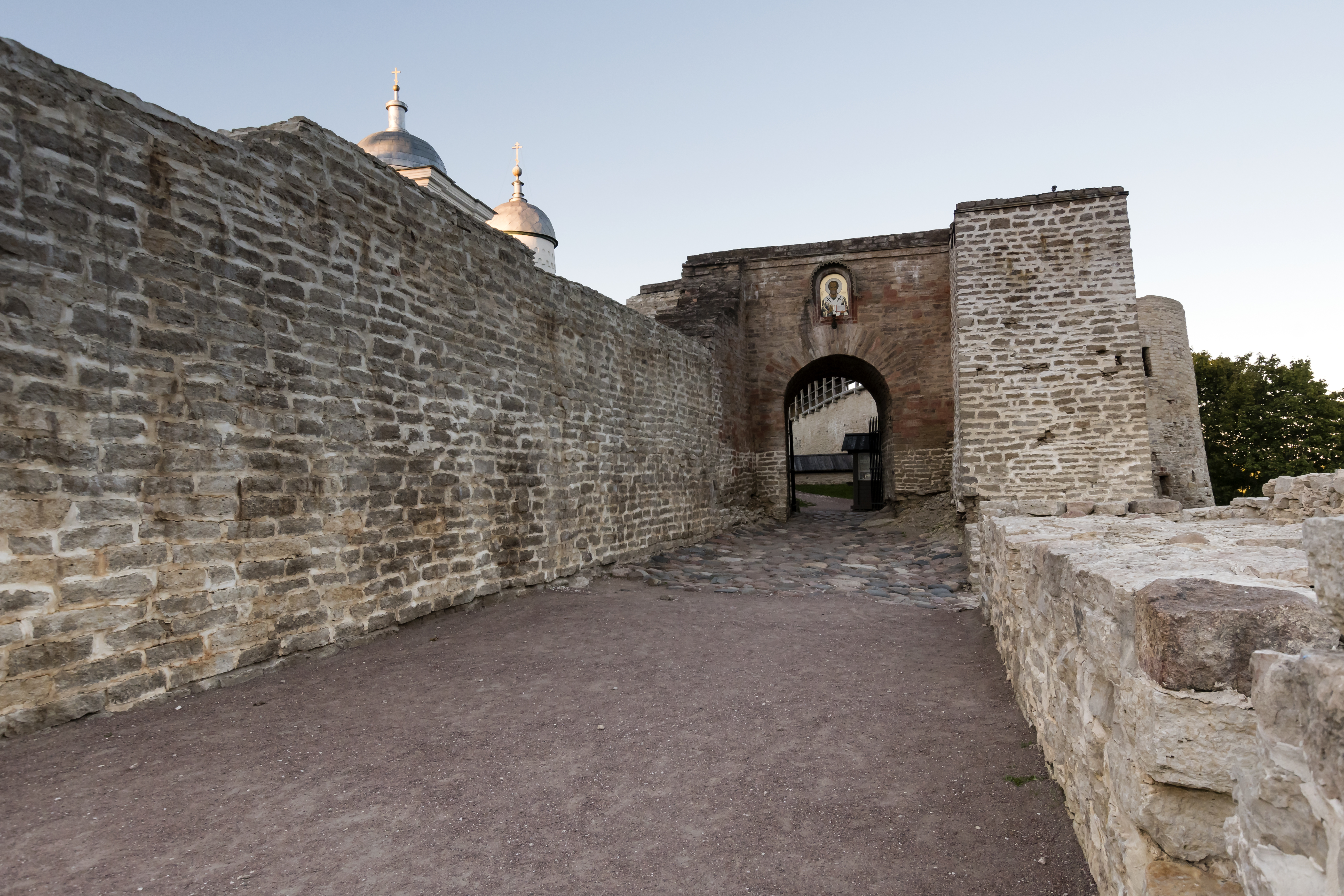 Изборская крепость, Печорская ул., 39, Изборск, Псковская обл., Россия, 181518